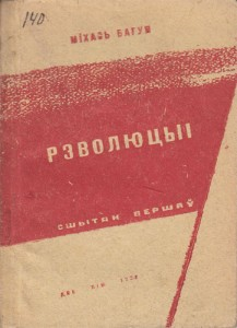 Міхась Багун. Рэволюцыі